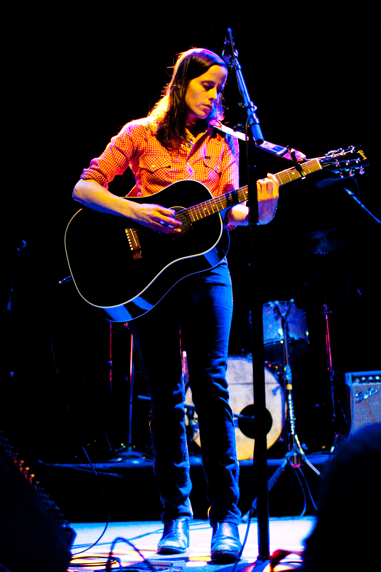 Son Volt + Sera Cahoone-3